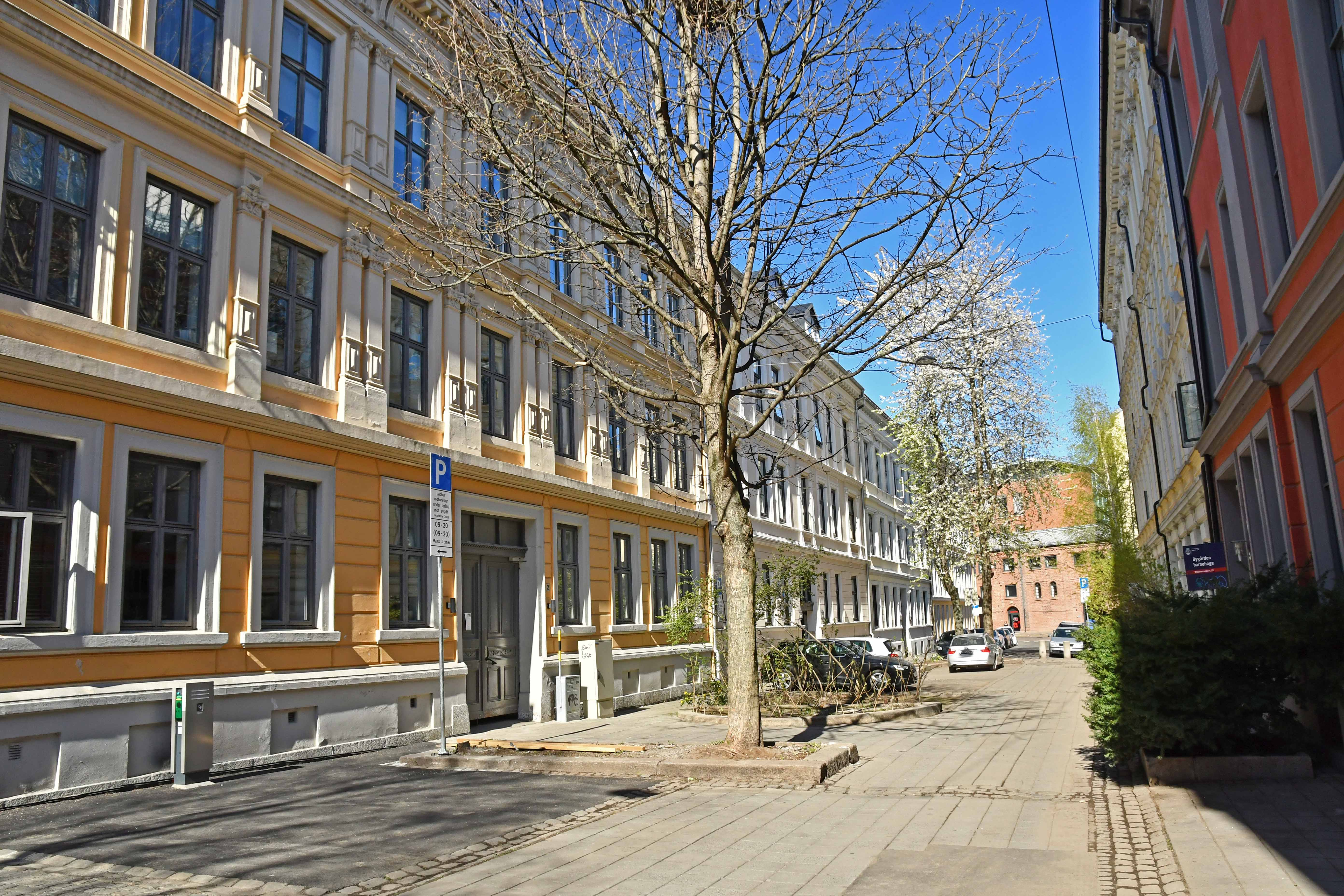 Mauritz Hansens gate 2, 4 og 6 sett mot Pilestredet med gatetun fra 1980-årene